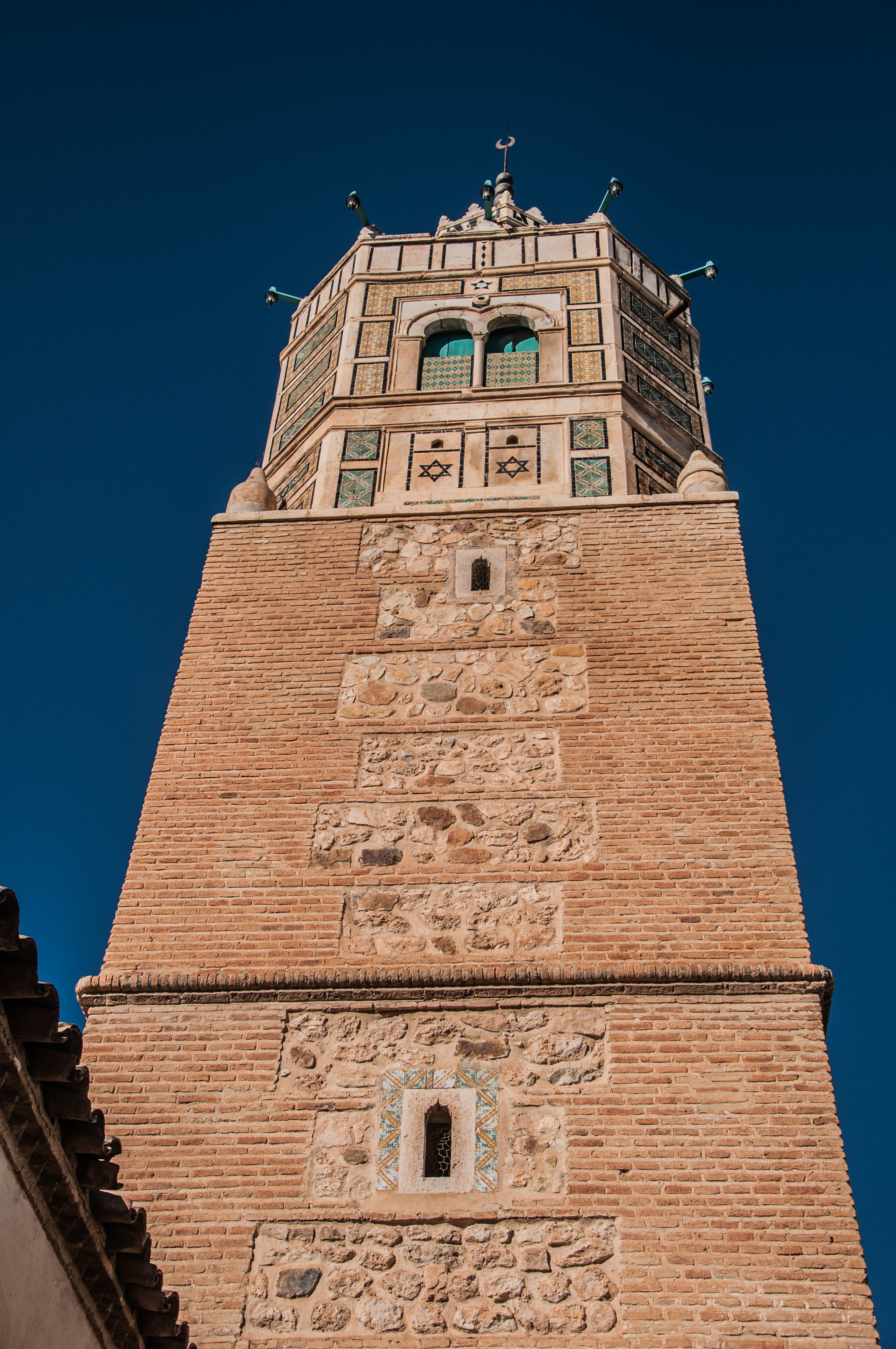 Testour - Tunsie